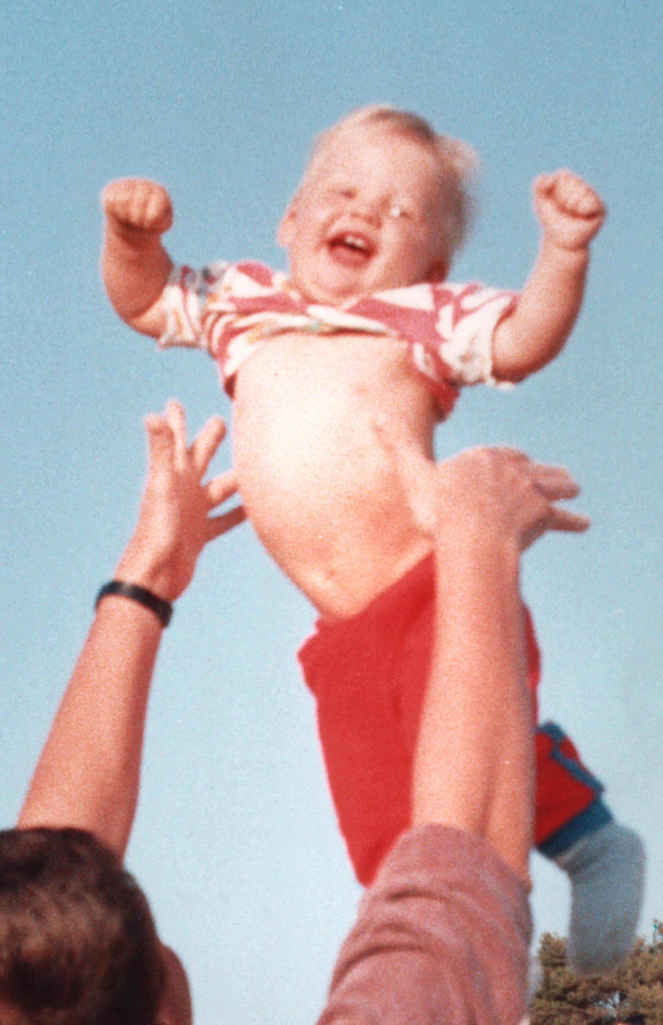 Lebensfreude (m)eines Kleinkindes (Ben) Quelle: eigenes Familienfoto Urheber: Ehefrau und Mutter des Kindes